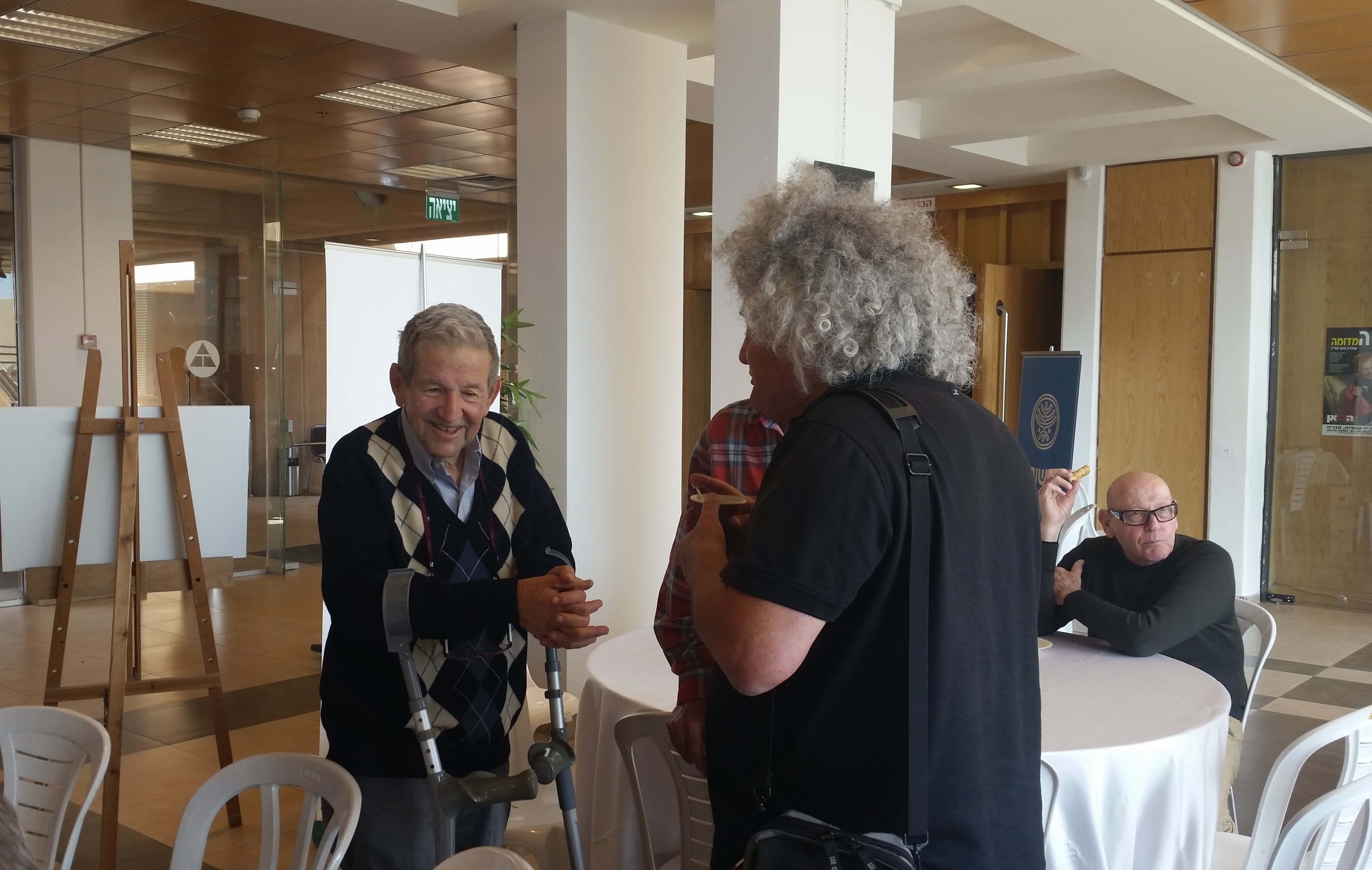 פרופסור יורם צפריר משמאל ביום עיון לזכרו של אמיר דרורי מייסד רשות העתיקות ומנהלה הראשו שהתקיים בטבריה